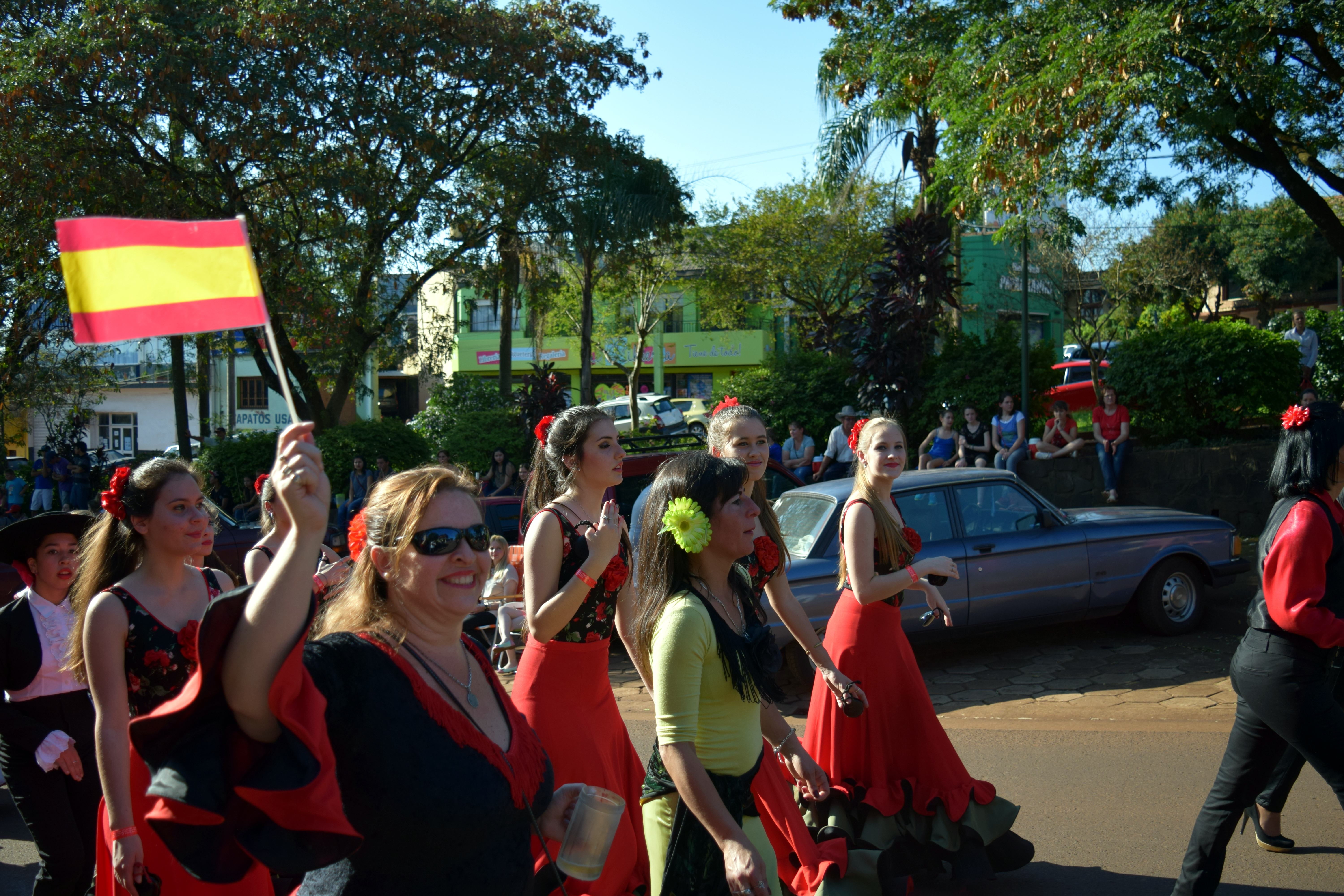 Desfile inaugural de la XXXV Fiesta Nacional del Inmigrante realizada en Septiembre de 2014 en Oberá, provincia de Misiones, Argentina.